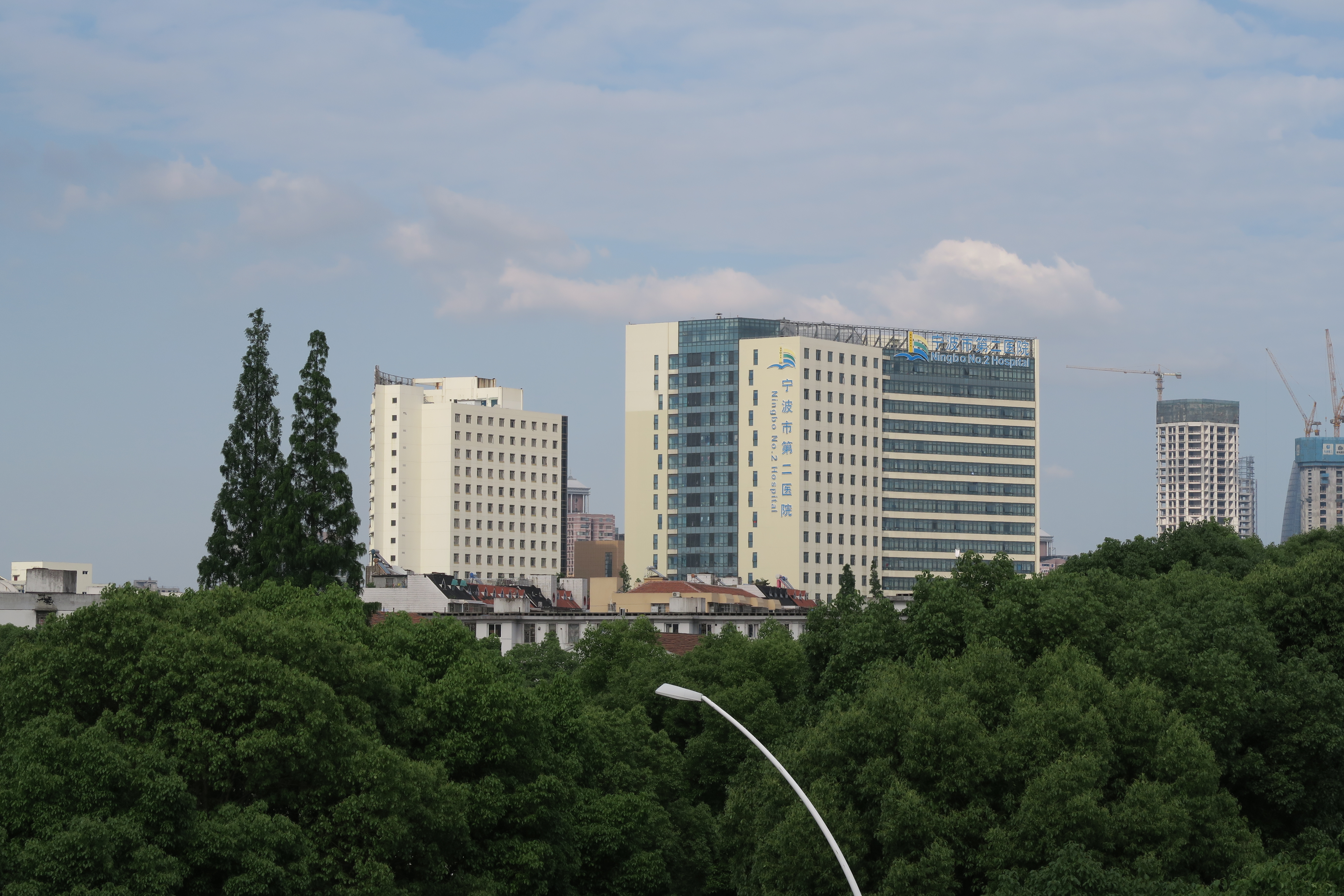 宁波市第二医院